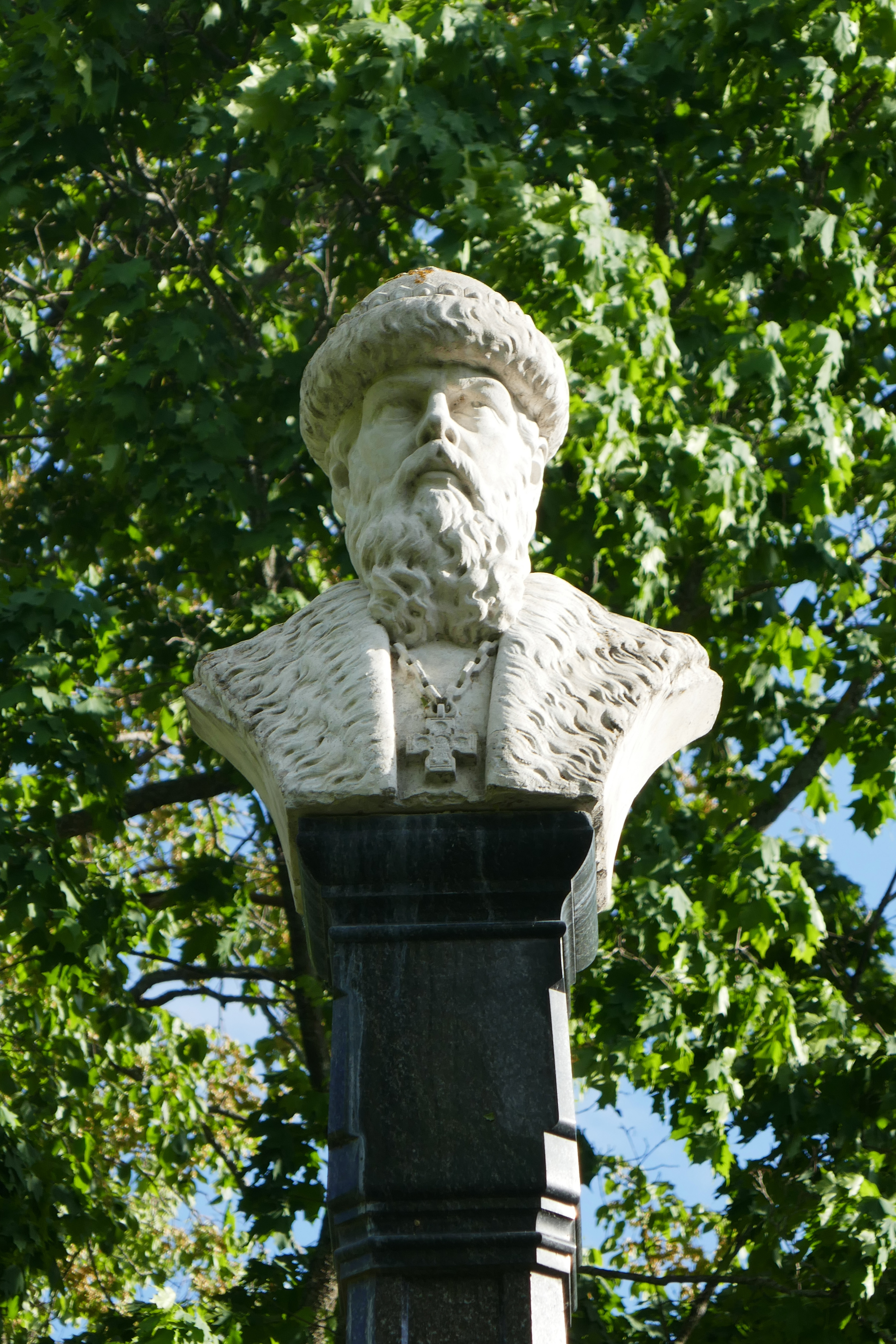 Plyos (Oblast d'Ivanovo) : monument à la mémoire de son fondateur Vasily I.